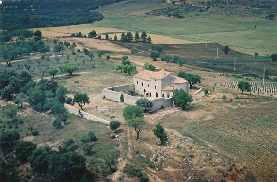 Ancien prieuré de Valmogne_photo c1975_Baudinard sur Verdon (Var, France)